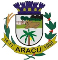 Brasão de Araçu, Goiás, Brasil.